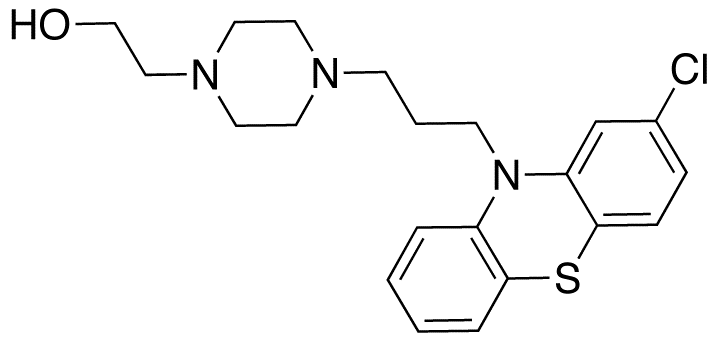 2d molecular structure of Perphenazine